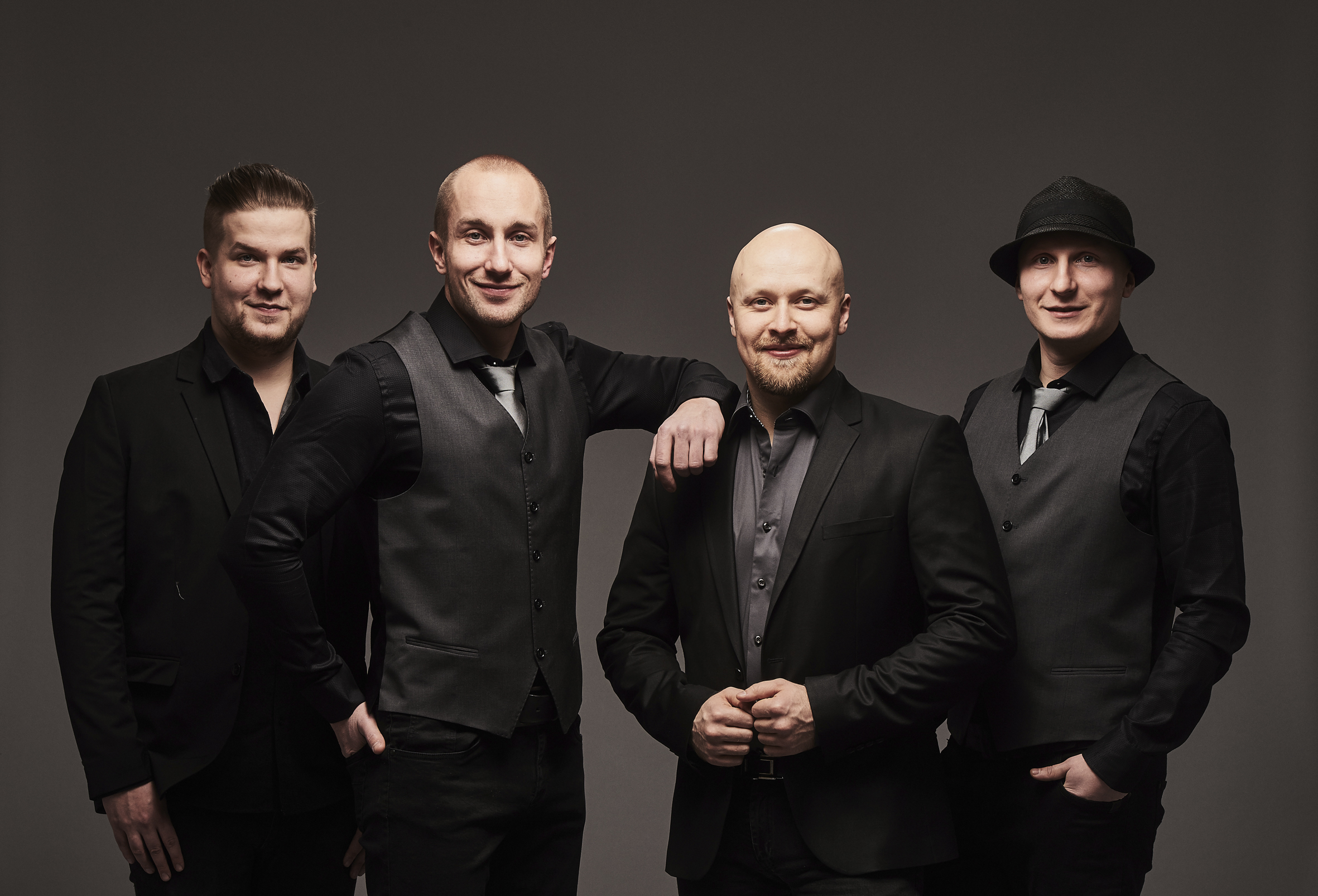 Onnentähti orkesteri